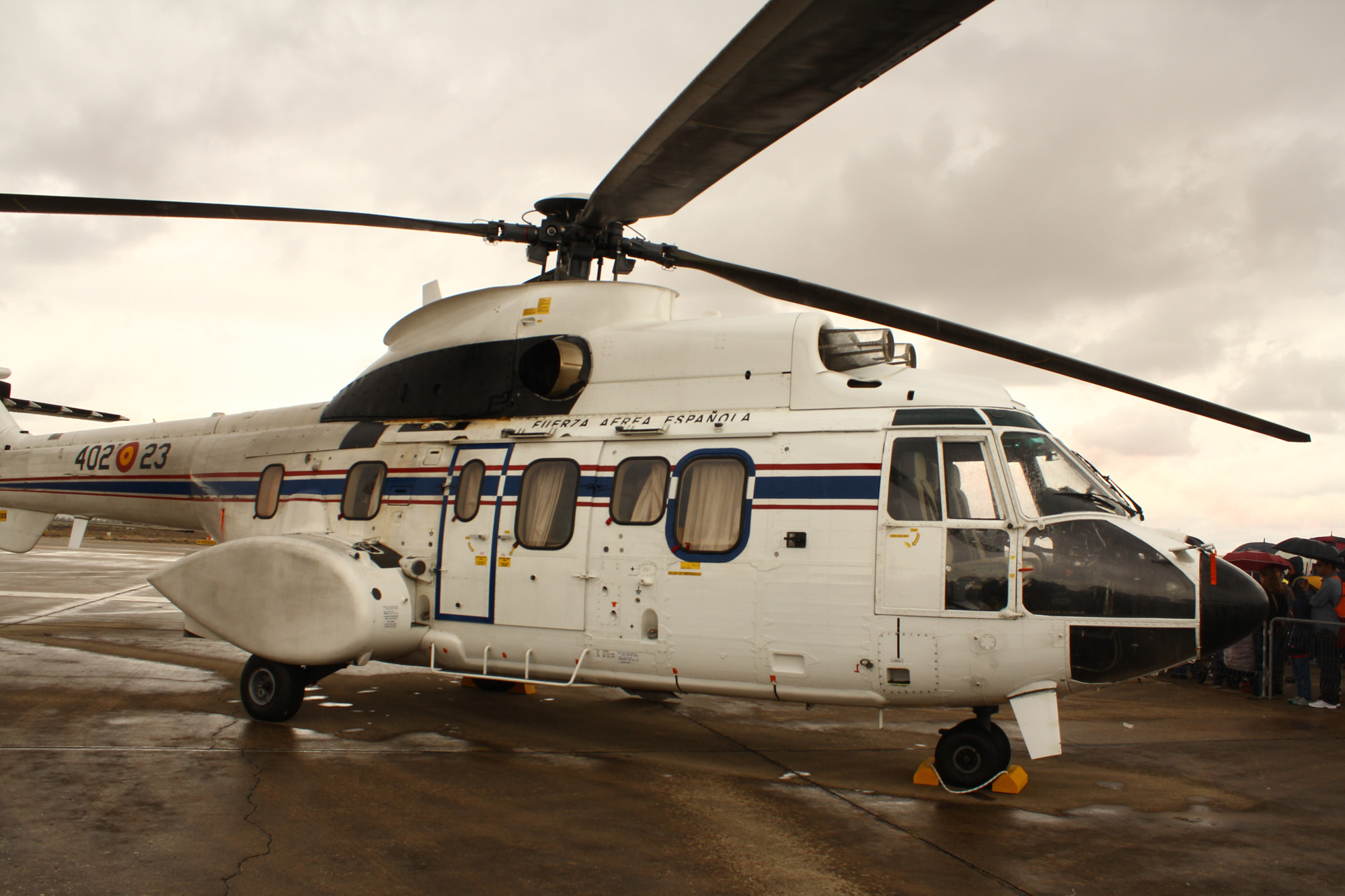 Festival Aéreo Internacional Aire75, celebrado el 11 de octubre de 2014 en la Base Aérea de Torrejón de Ardoz, Madrid, con motivo del 75º aniversario del Ejército del Aire de España. Aire75 International Airshow, held on October 11, 2014 at the Torrejón de Ardoz Air Base, Madrid, to celebrare the 75th anniversary of the Spanish Air Force.